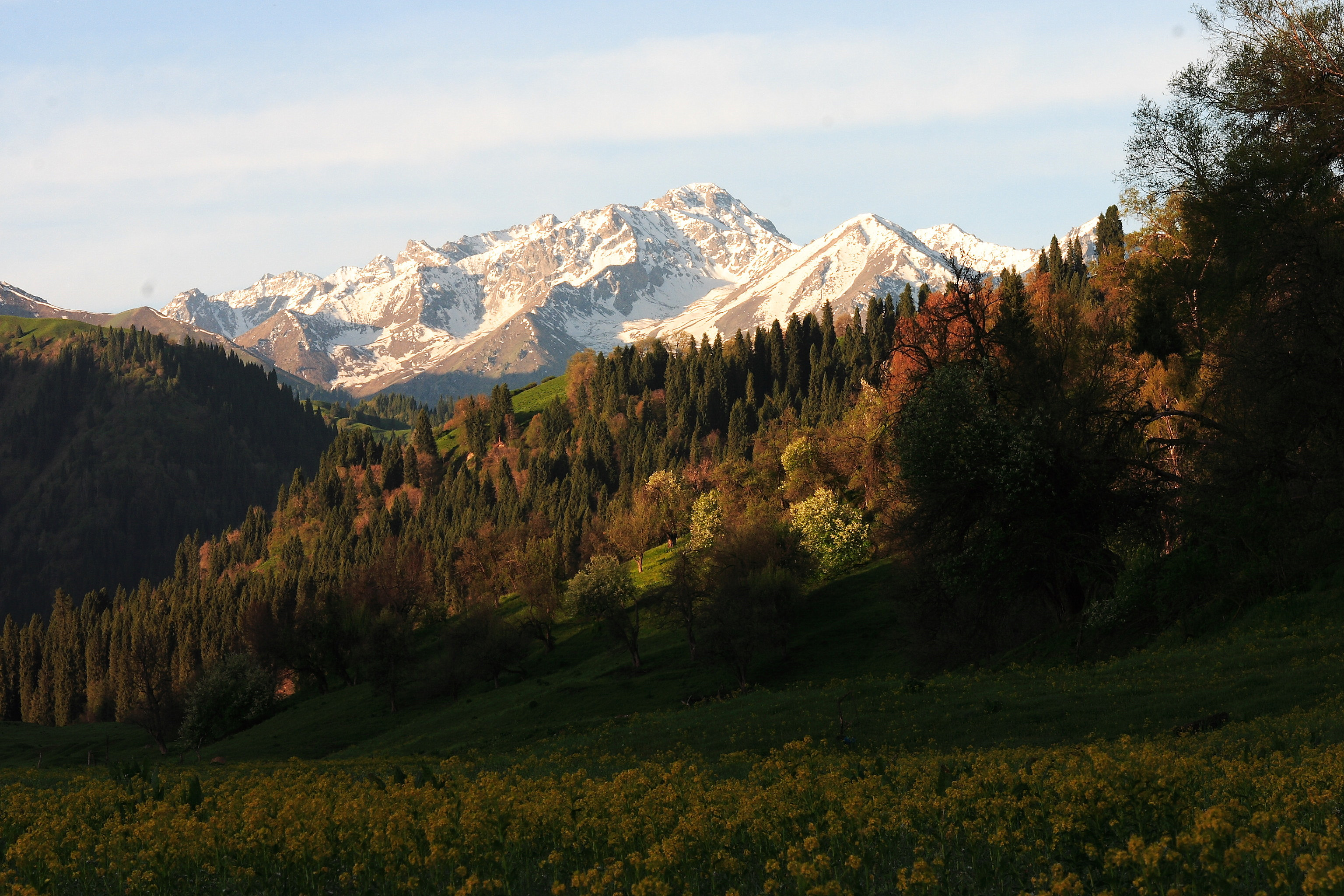 Yili, Xinjiang, China